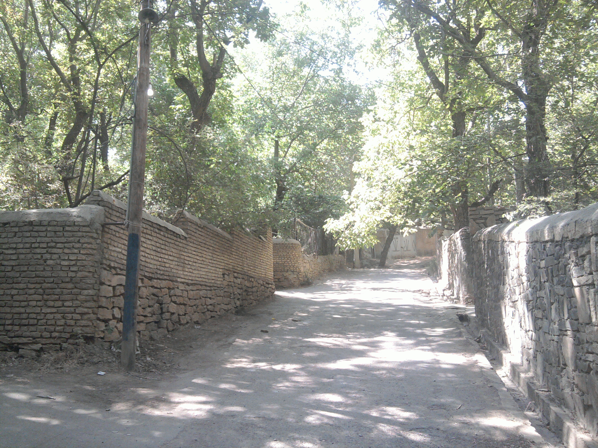 کوچه باغ